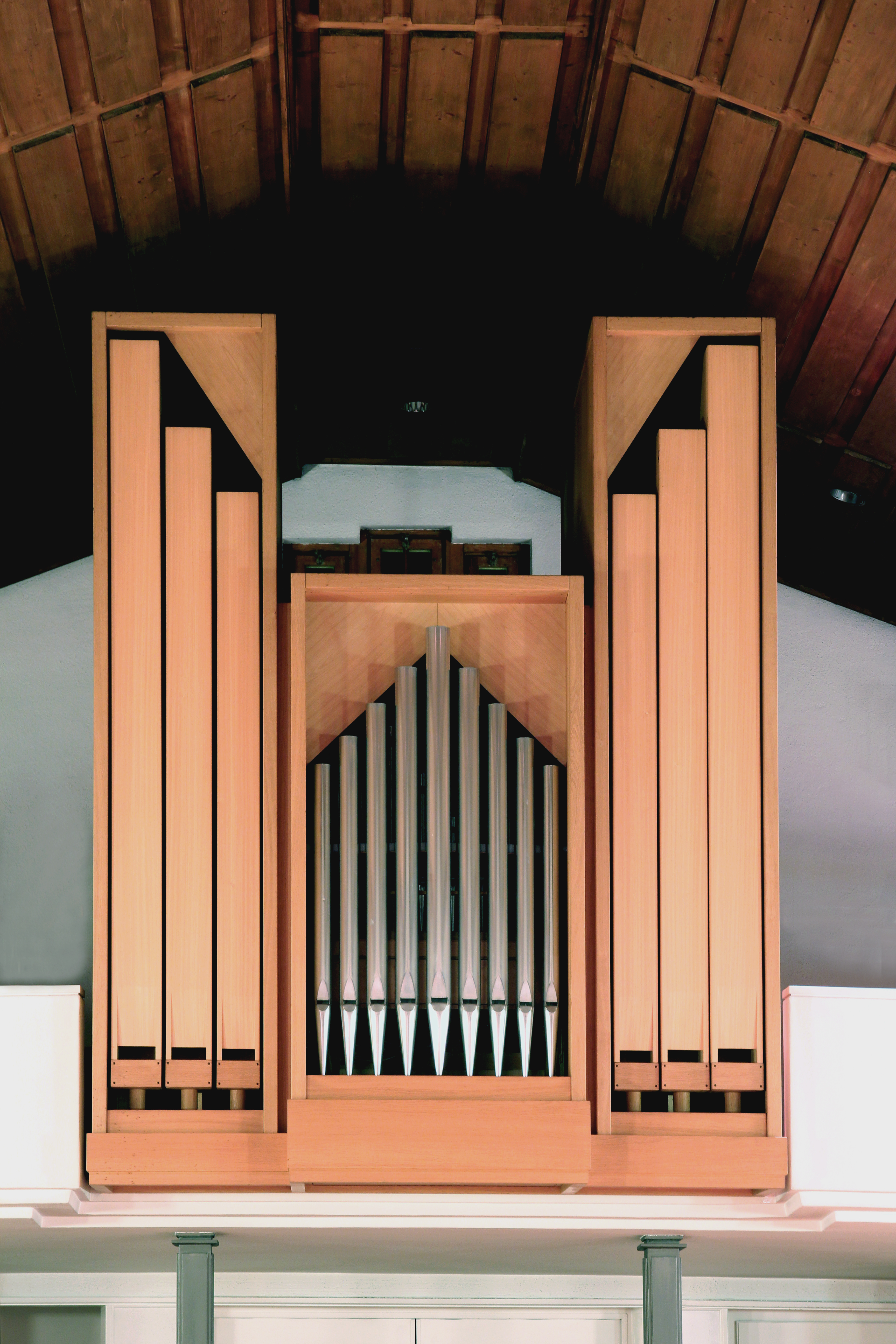 Römisch-katholische Pfarrkirche St. Judas Thaddäus Eglisau, Orgel